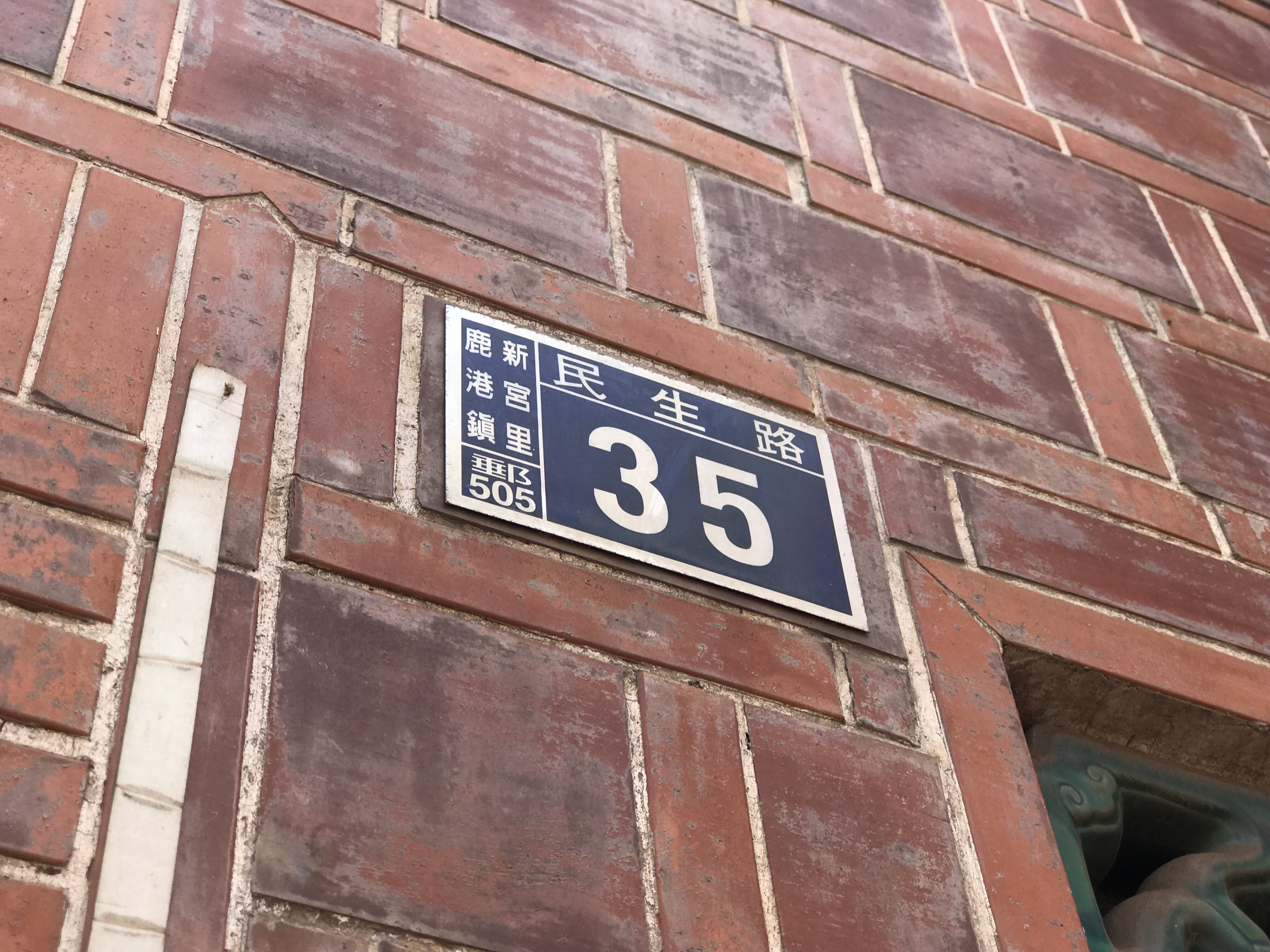 鹿港永安宮門牌